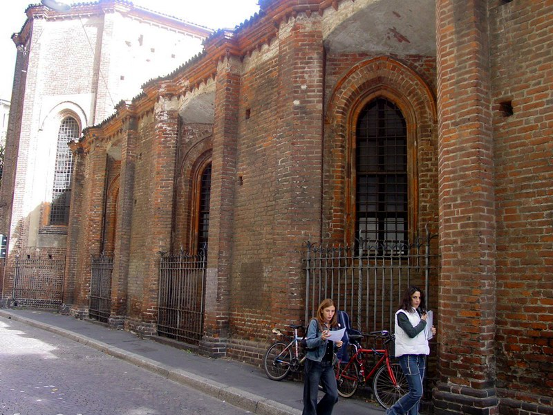 Chiesa di San Pietro in Gessate (Milano, Italy). Fianco sinistro.